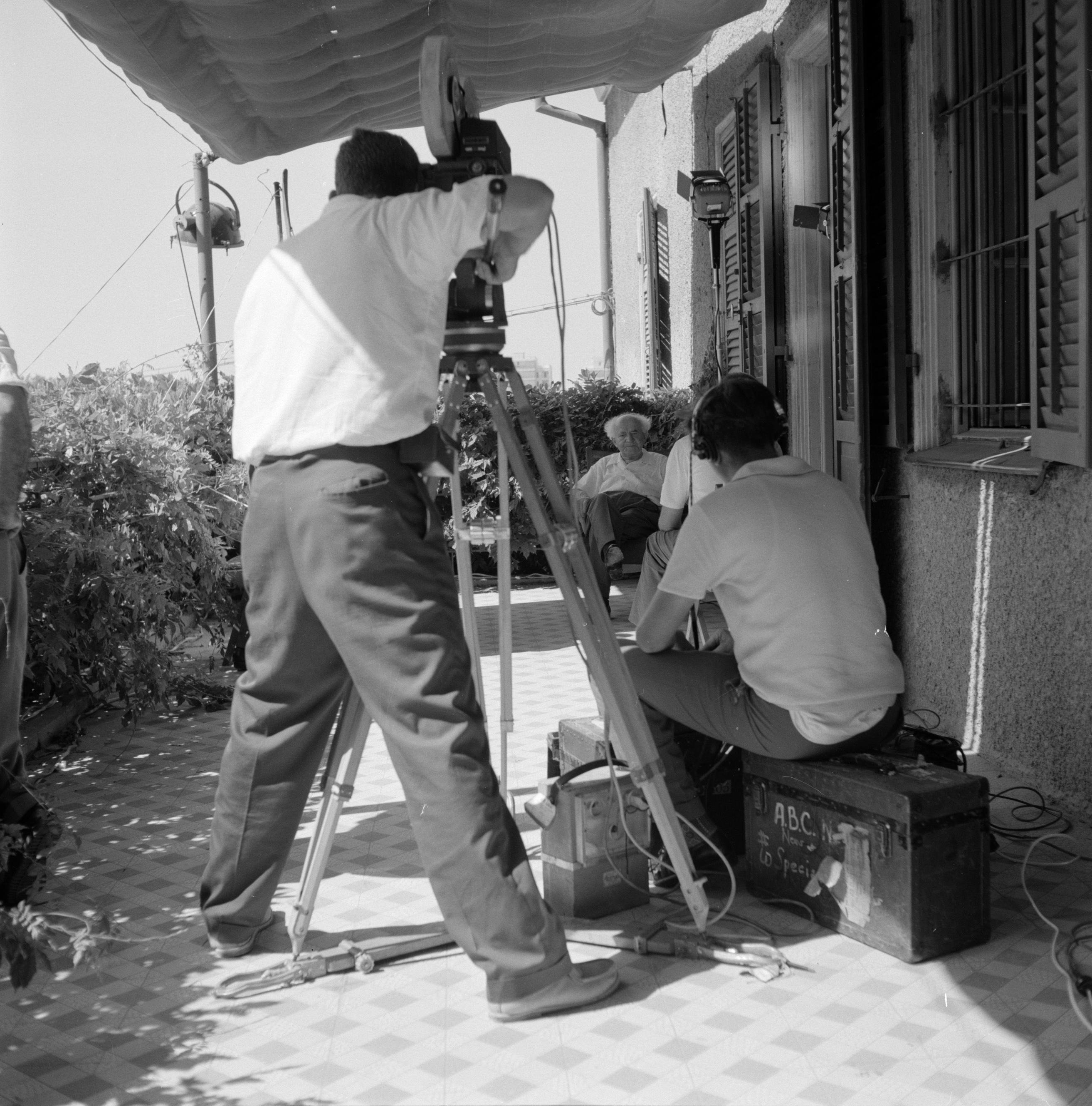 Collectie / Archief : Fotocollectie Van de Poll Reportage / Serie : [ onbekend ] Beschrijving : David Ben-Gurion tijdens de opname van een gefilmd interview door de National Broadcast Corporation. De filmploeg aan het werk Datum : 1 januari 1964 Locatie : Israël Trefwoorden : interviews, politici, werkopnamen Persoonsnaam : Ben Goerion, David Fotograaf : Poll, Willem van de Auteursrechthebbende : Nationaal Archief Materiaalsoort : Negatief (zwart/wit) Nummer archiefinventaris : bekijk toegang 2.24.14.02 Bestanddeelnummer : 255-4227